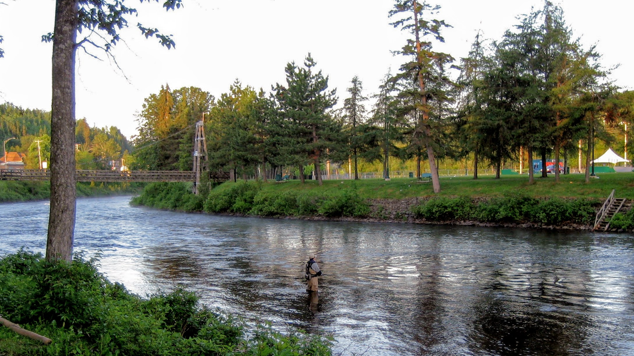 Pecheur au saumon sur la rivière Matapédia, Causapscal, Québec (fosse Les Fourches).